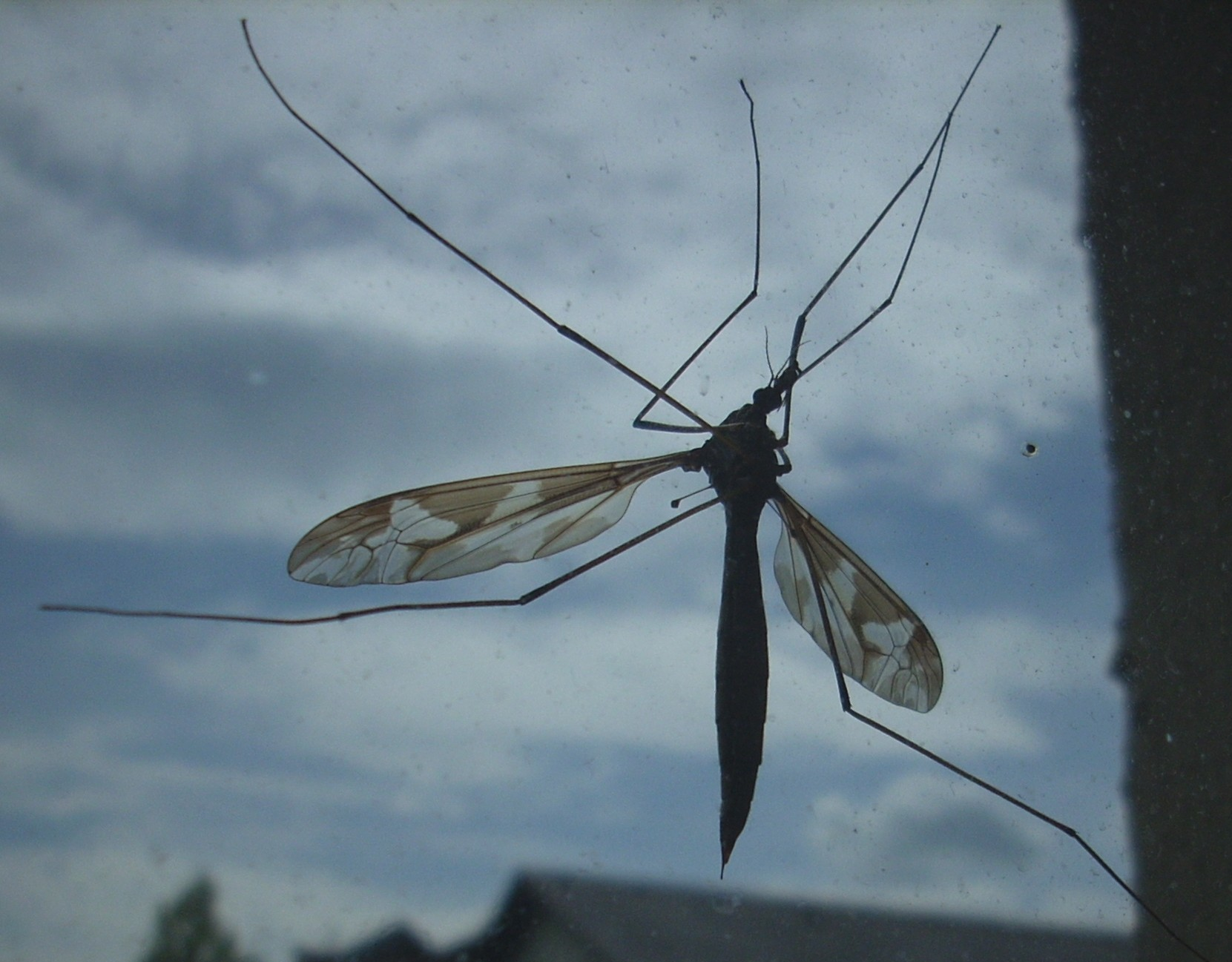 Tipula maxima